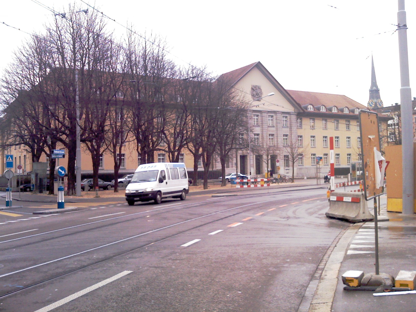 District Building of Zurich, Switzerland